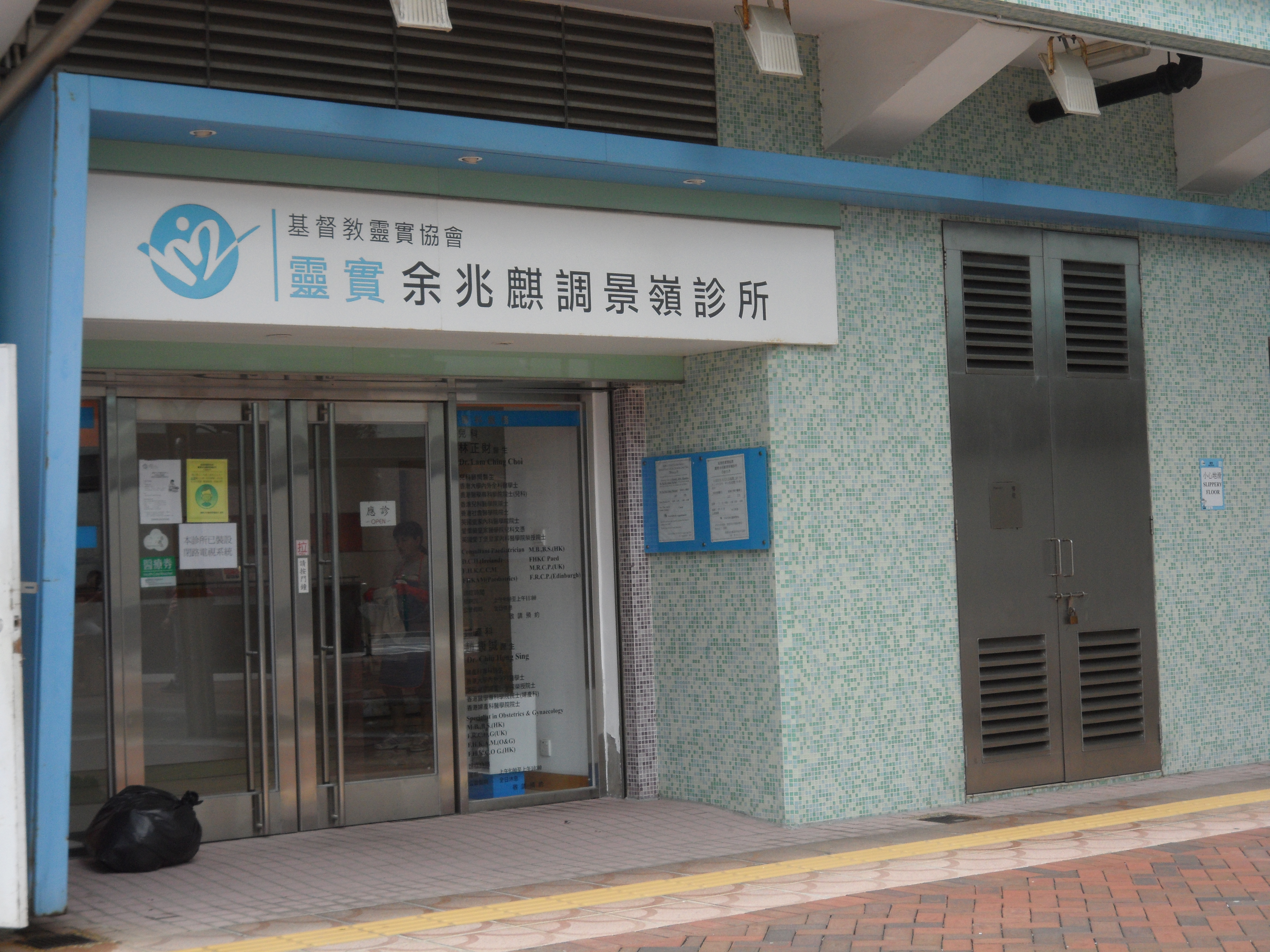 健明邨靈實診所